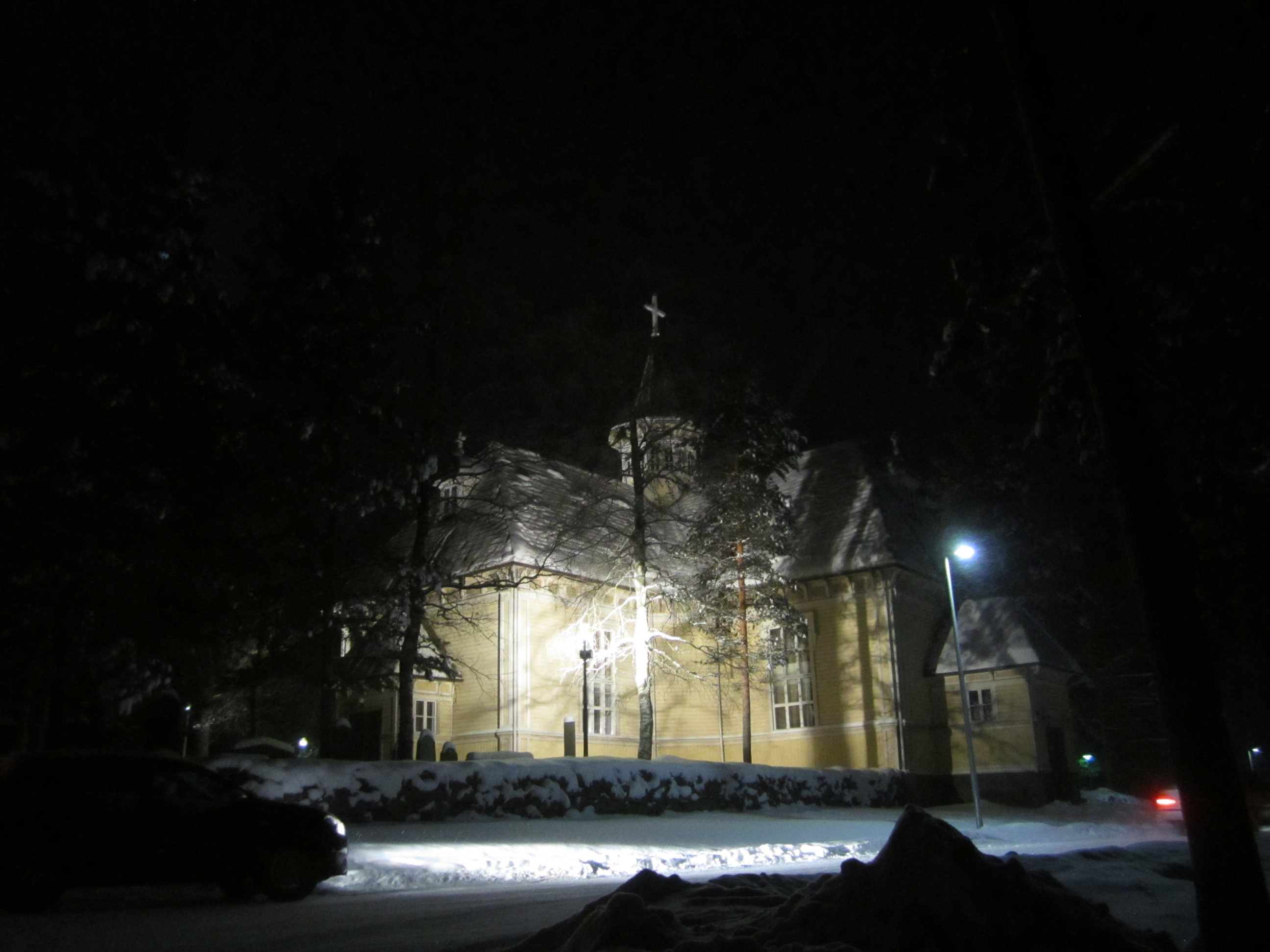 Töysän kirkko jouluaattona 2012.